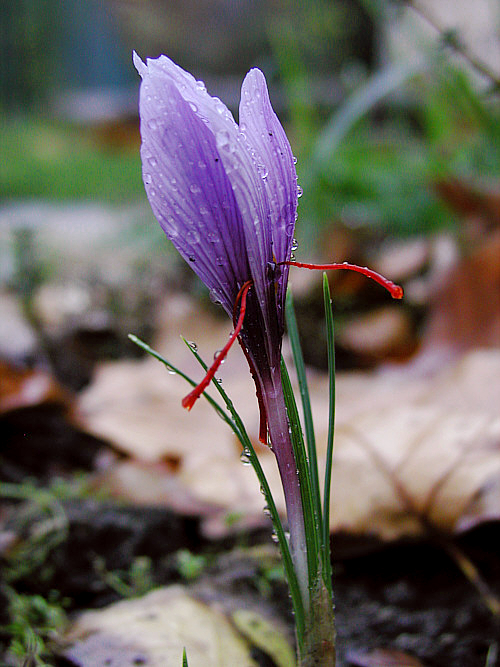 Safrankrokus (Crocus sativus) von der Seite mit heraushängenden Staubfäden; Anfang November; Gut Gimritz auf der Peißnitzinsel bei Halle/Saale, Deutschland